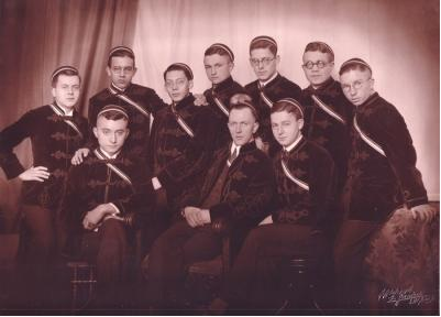 Confuxia des Leipziger Wingolfs in den 20er Jahren